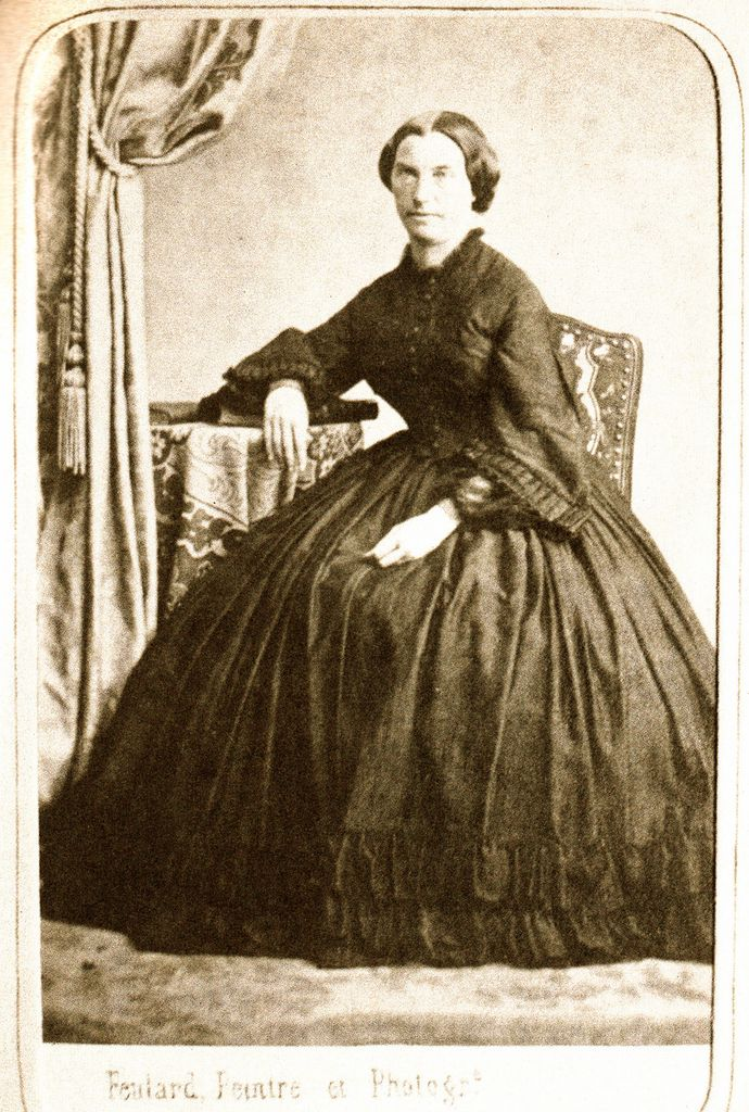 Laure Le Poitevin, madre de Guy